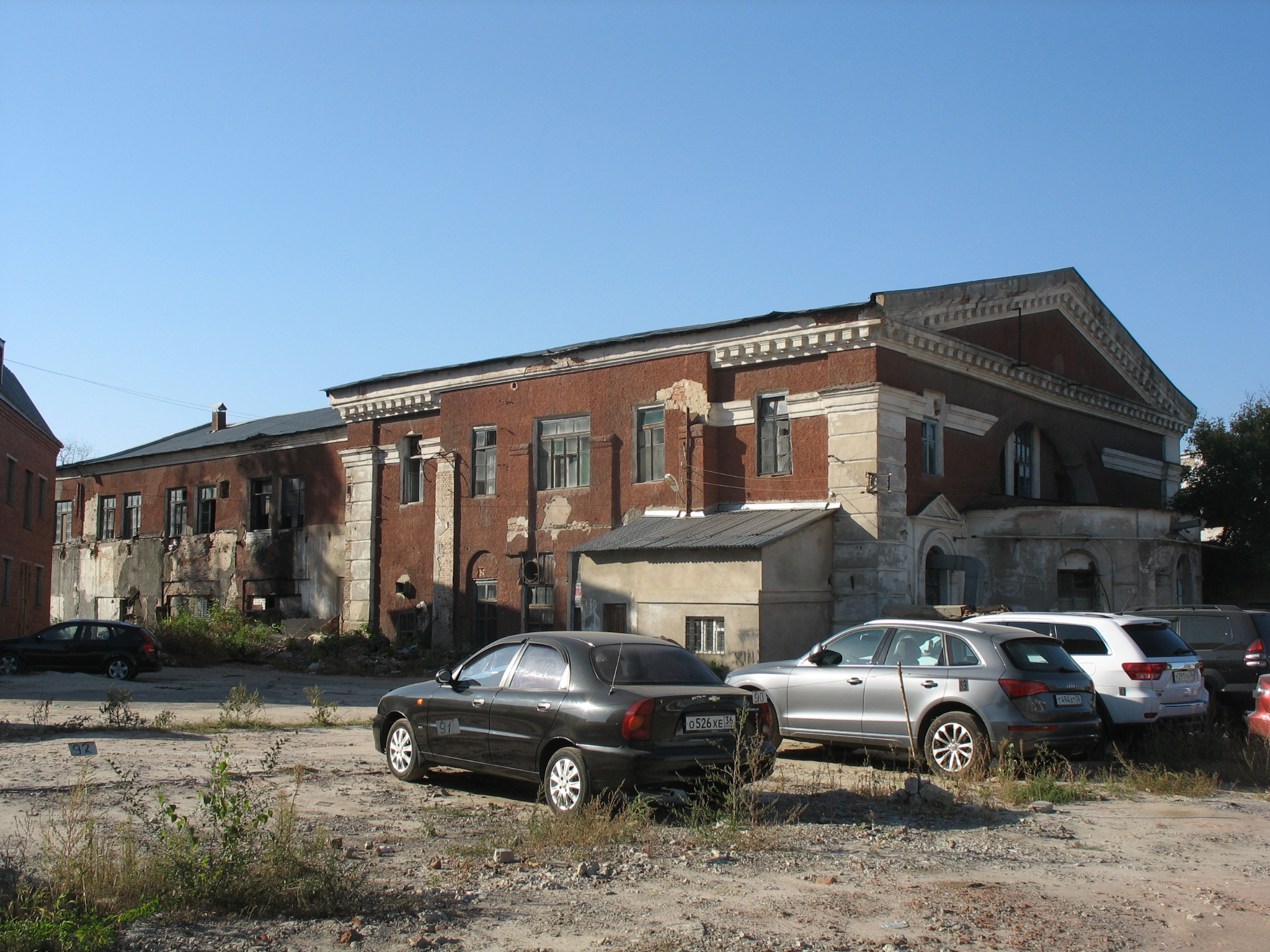 Церковь Рождества Христова на Придаче: улица Димитрова, 51, Воронеж, Воронежская область